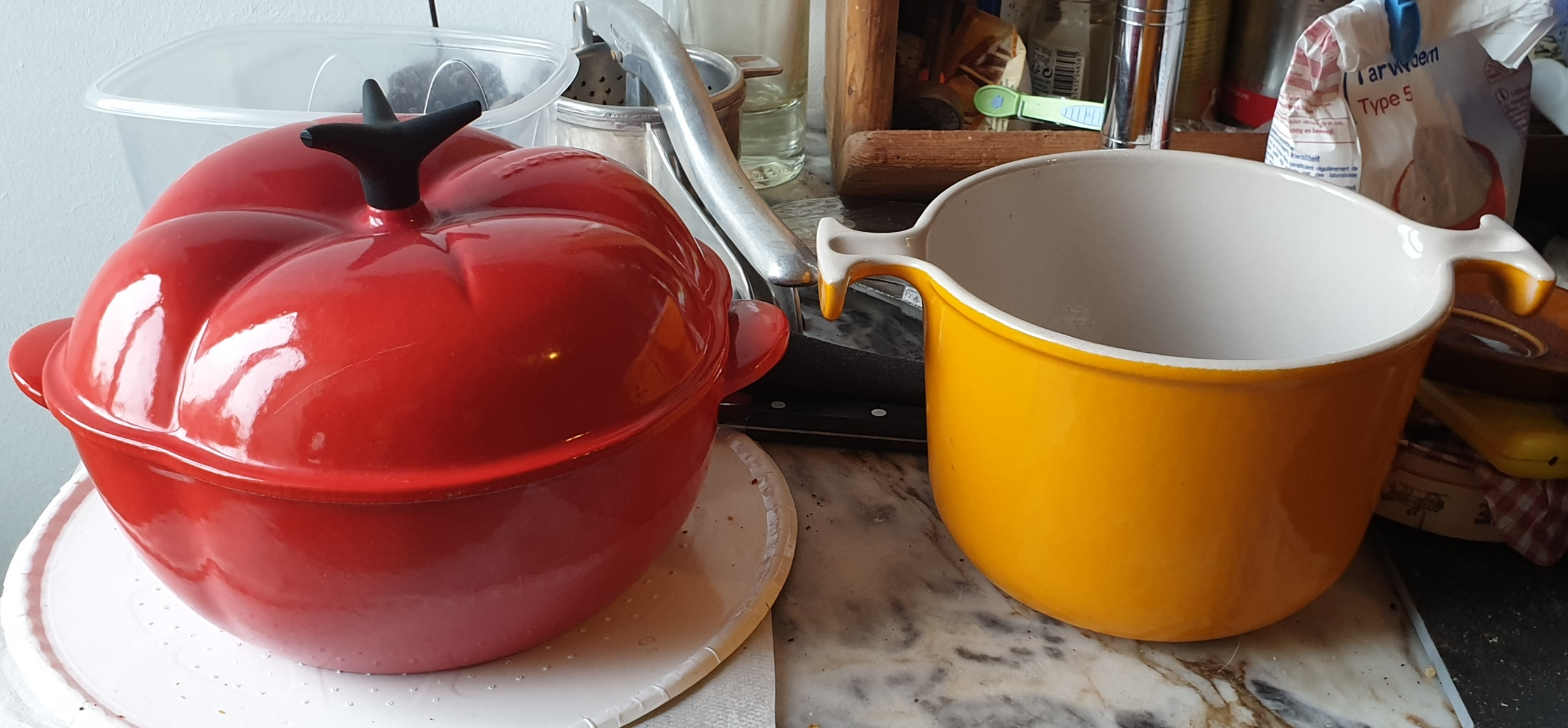 Le Creuset. Cocotte tomate 21 cm en fonte. Caquelon 15,5 cm en fonte Enzo Mari.